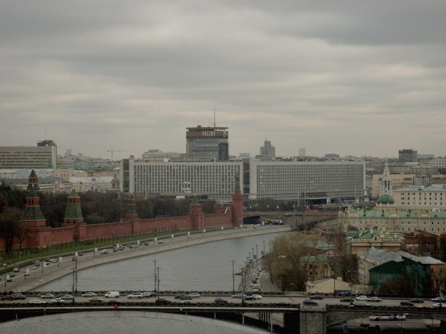 Hotel Rossija von der Aussichtsplattform der Erlöserkathedrale